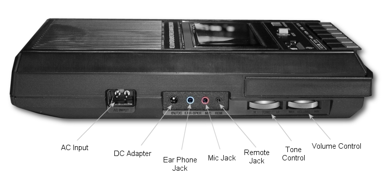 Foto eines Texas Instruments TI Program Recorder (Seitenansicht)